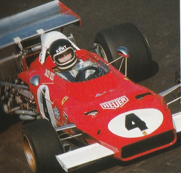 Monza, Autodromo Nazionale, 10 settembre 1972. Il pilota automobilistico belga Jacky Ickx su Ferrari 312 B2 al Gran Premio d'Italia 1972.